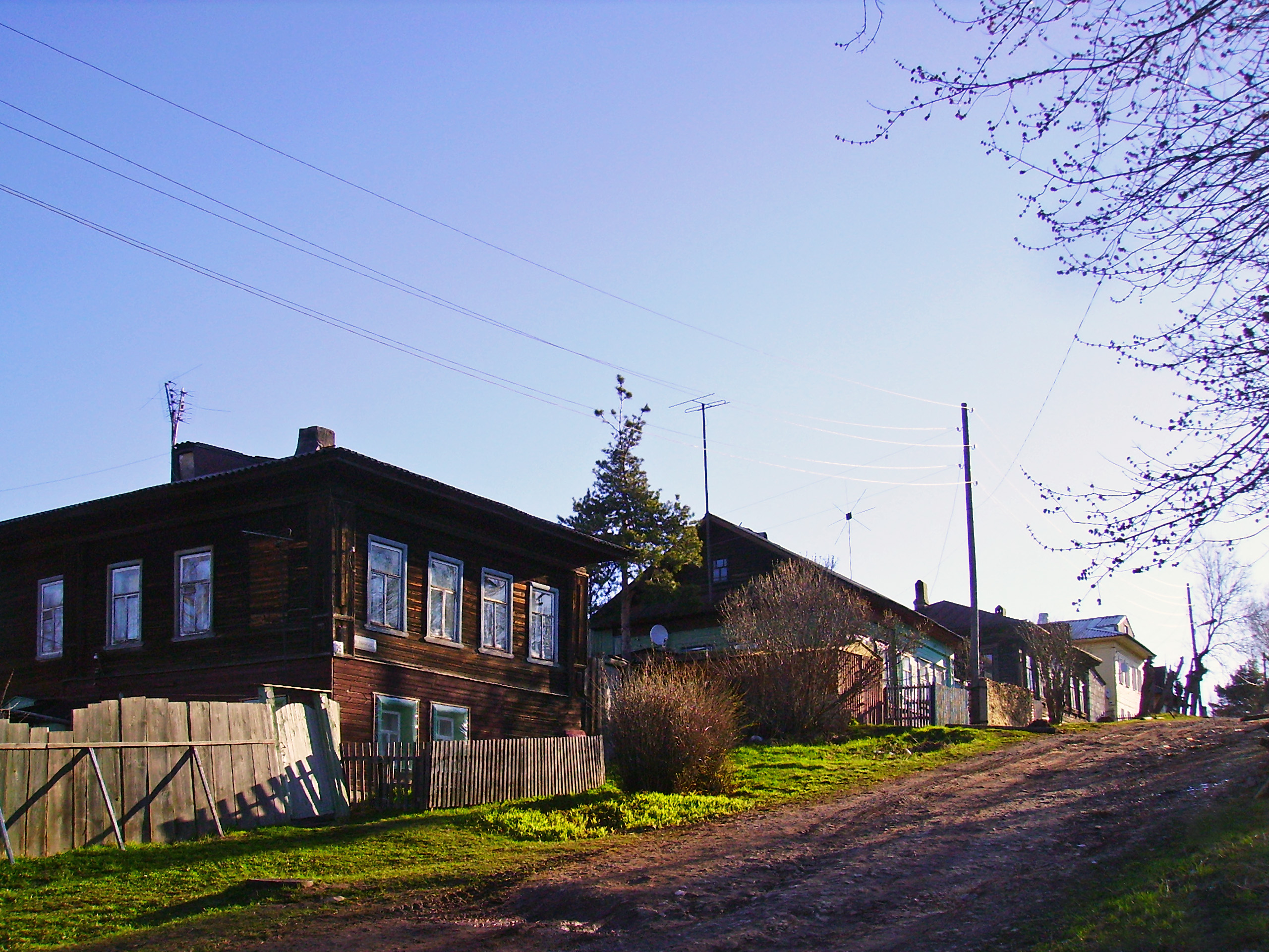 Котельнич. Уголок улицы Луначарского